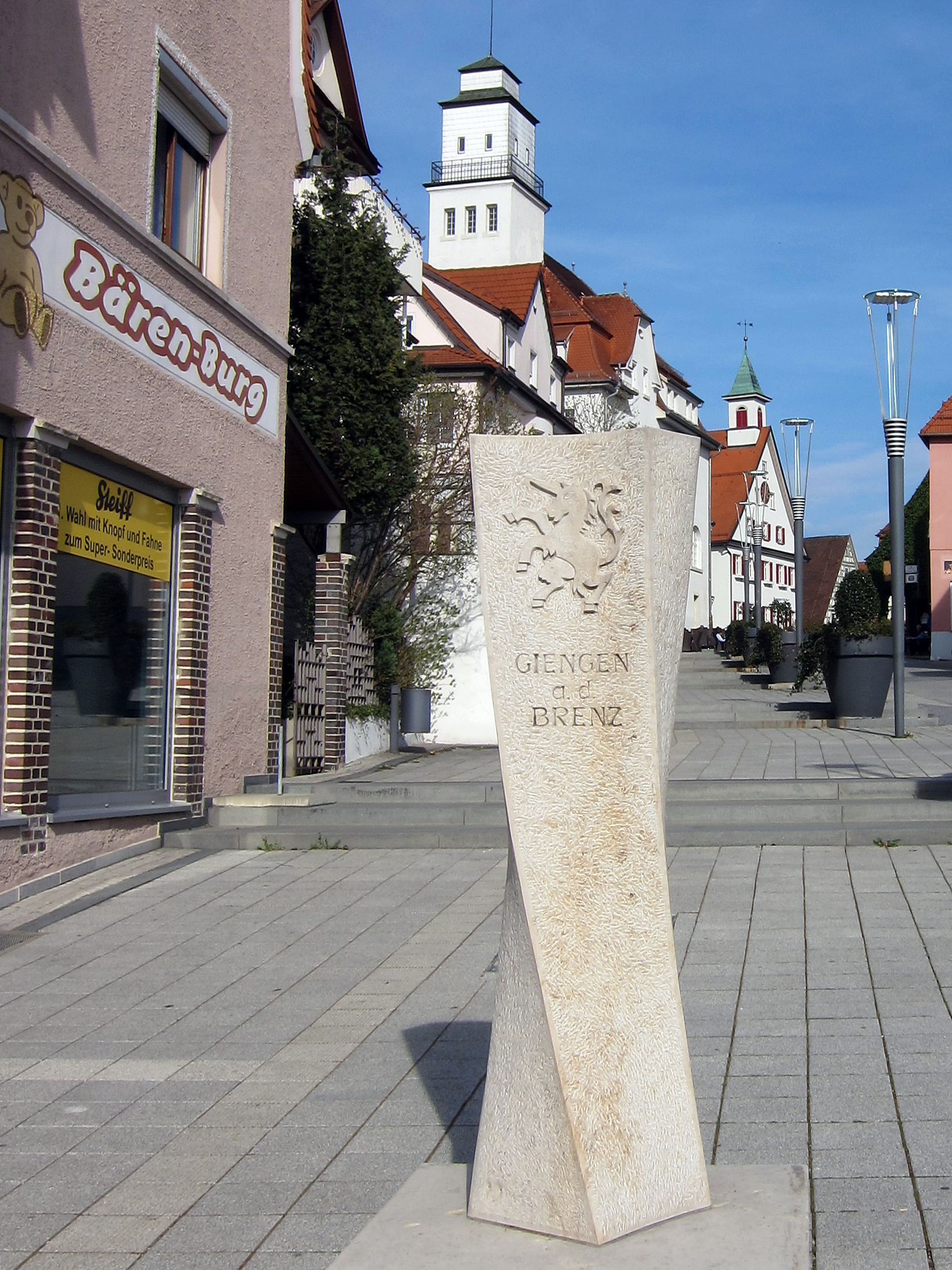 Giengen Burg- Ecke Marktstrasse